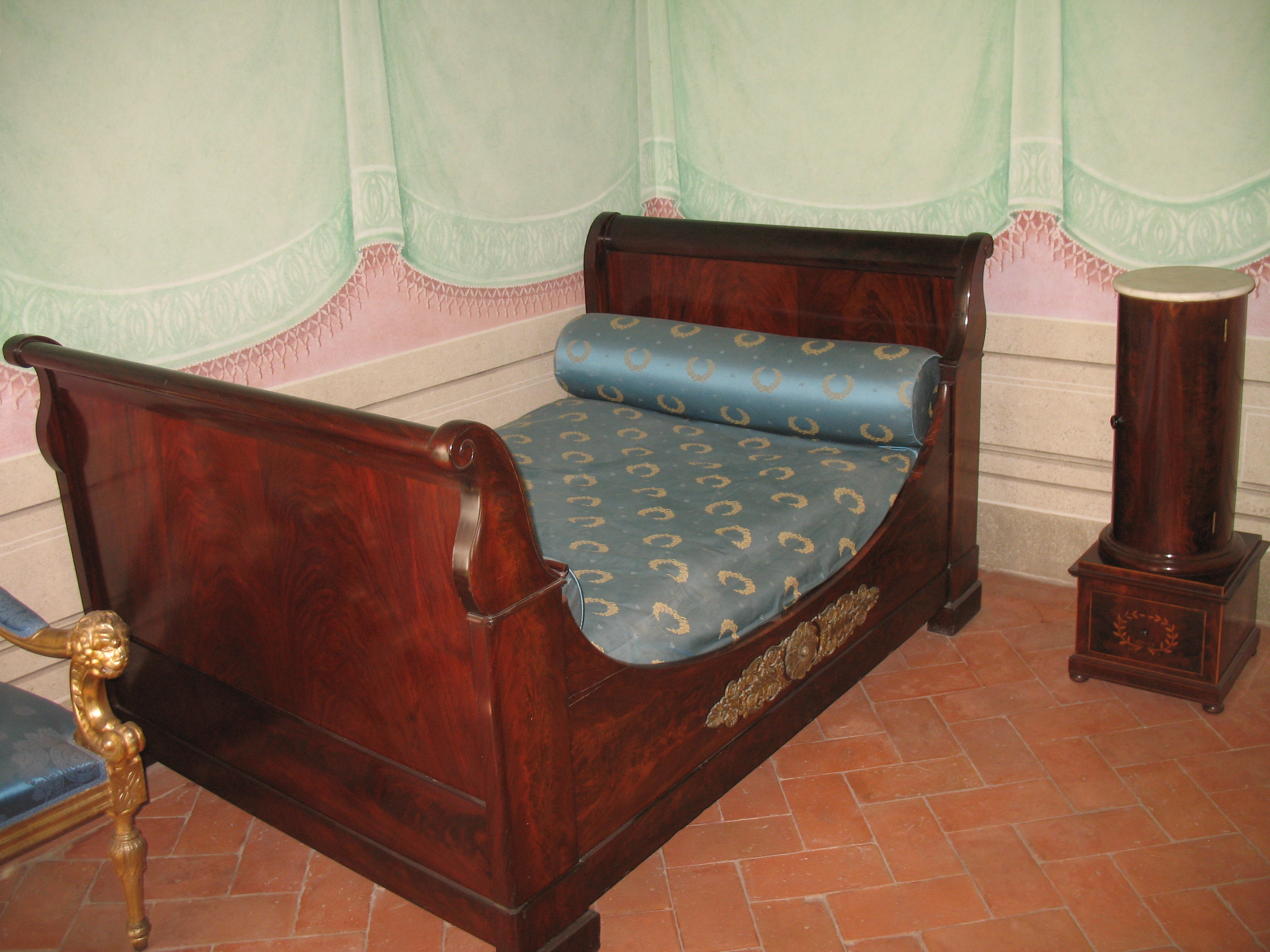 Lit de travers en bateau de style Empire, Villa de San Martino, Portoferraio, Ile d'Elbe.